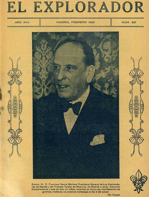 Imagen de Francisco García Molinas en la revista El Explorador, número 251, febrero de 1930.